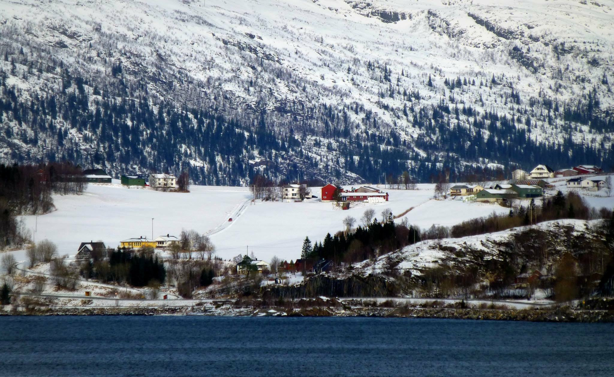 Lindsetgårdene sett fra nord